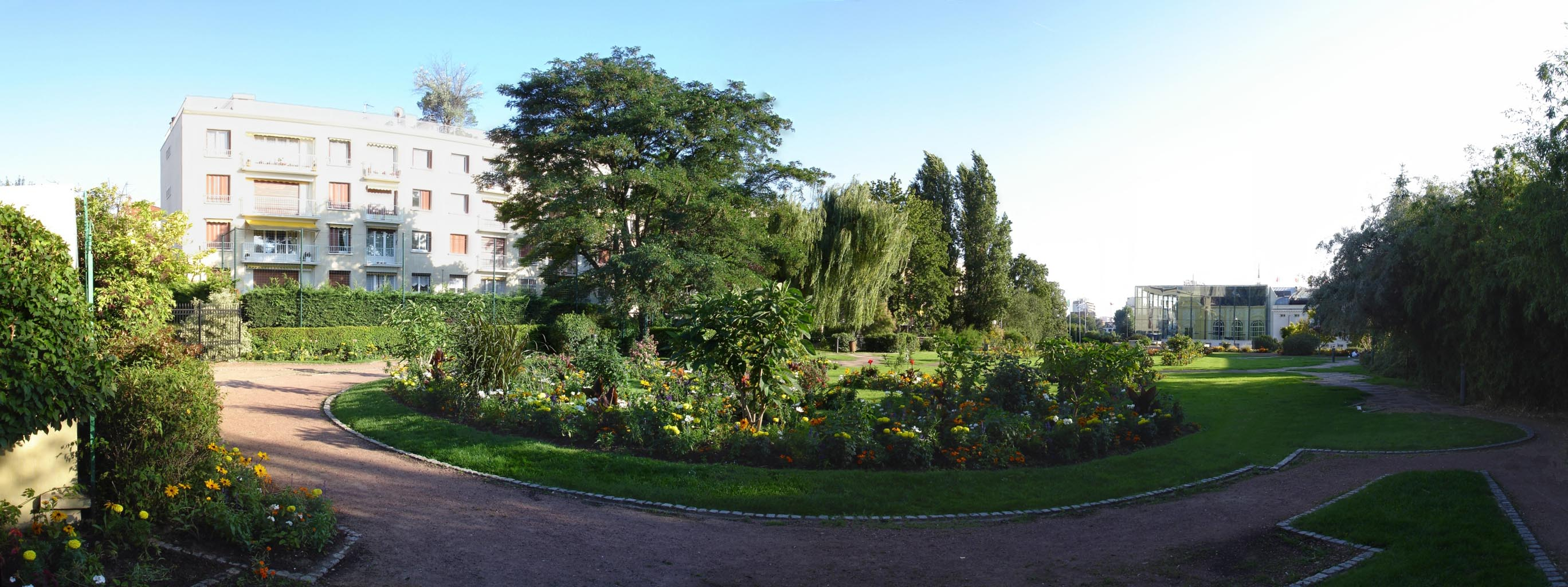 Panoramique du square de Villemessant à Enghien-les-Bains (Val-d'Oise), France Juillet 2007 Photo personnelle (own work) de Clicsouris